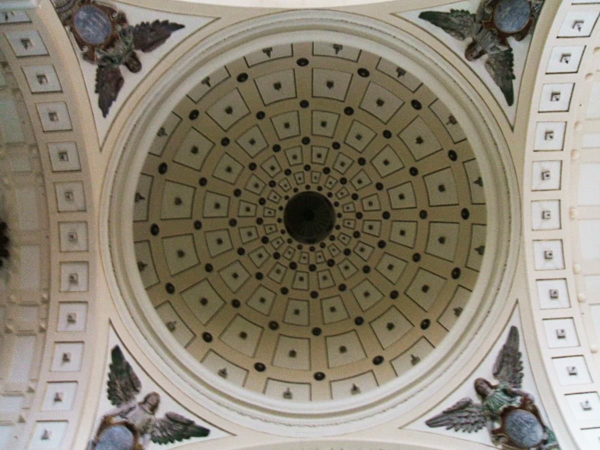 Bóveda sobre el crucero de la Iglesia de Nuestra Señora de la Calle, o de La Compañía, construcción jesuítica de finales del S-XVI, Palencia, Castilla y León, España